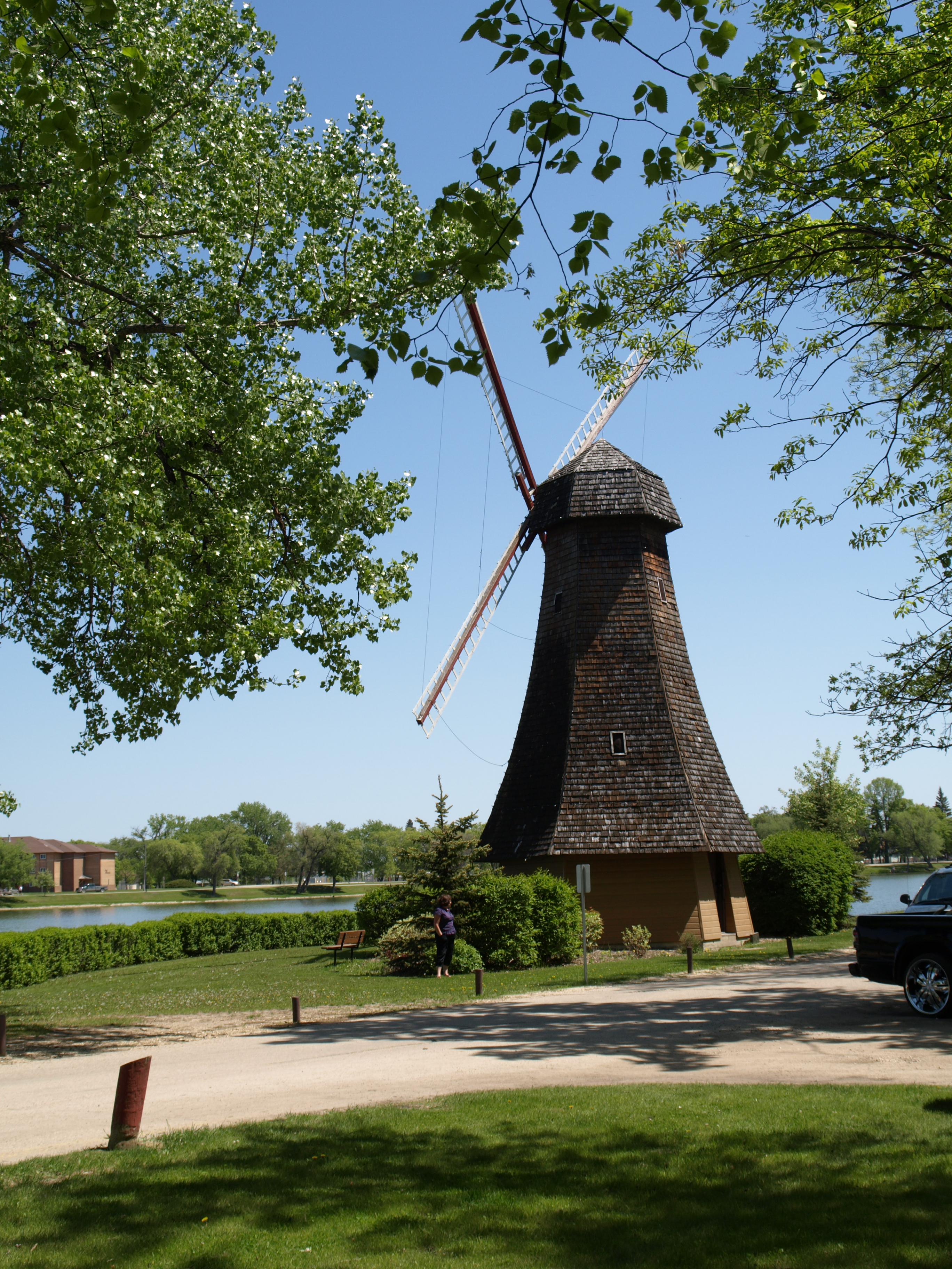 Portage La Prairie Manitoba Canada